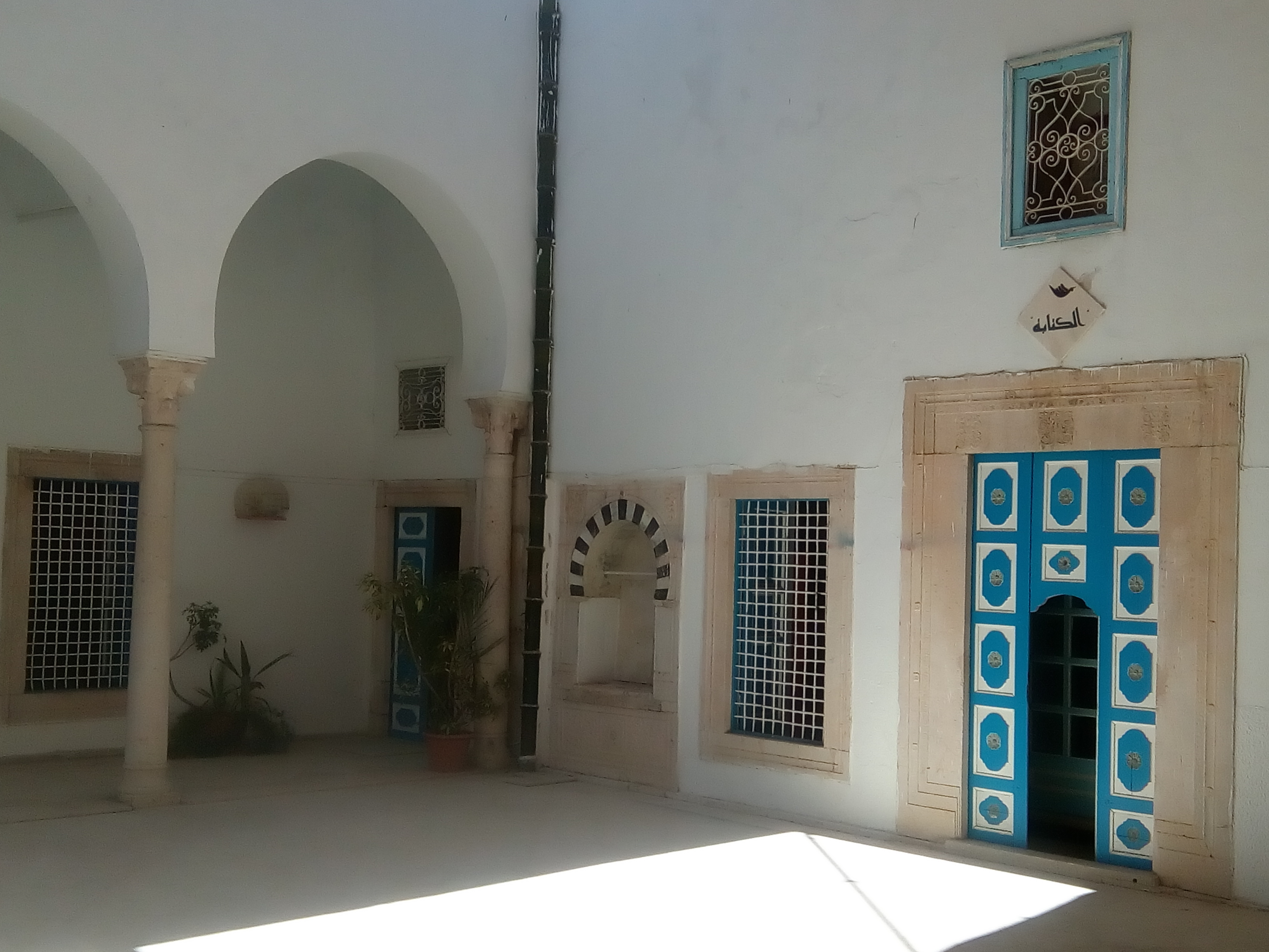 Dar El Jazira